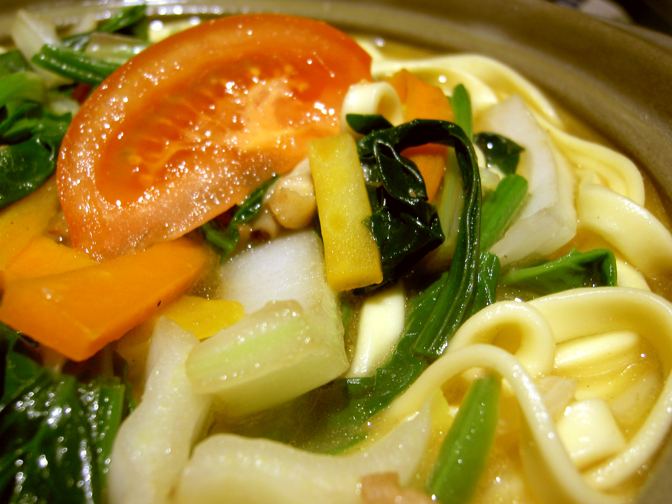 2006.01.26 20:57, Osaka Tengo (天神橋筋五丁目)